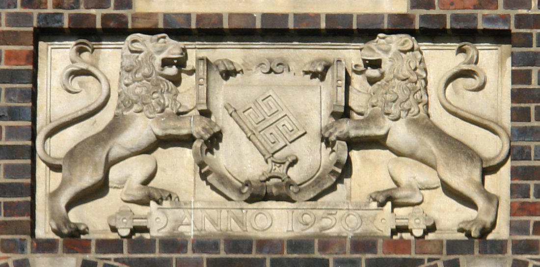 Rathscafé, Deutsches Haus in Bremen, Am Markt 1 - Wappenstein im First.Das abgebildete Objekt ist ein geschütztes Kulturdenkmal in der Freien Hansestadt Bremen, mit der Nr. 0068 beim Landesamt für Denkmalpflege registriert.